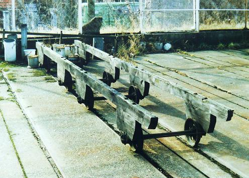 Kolej szklarniowa Akademii Rolniczej w Poznaniu - wózek typu Podlaska.